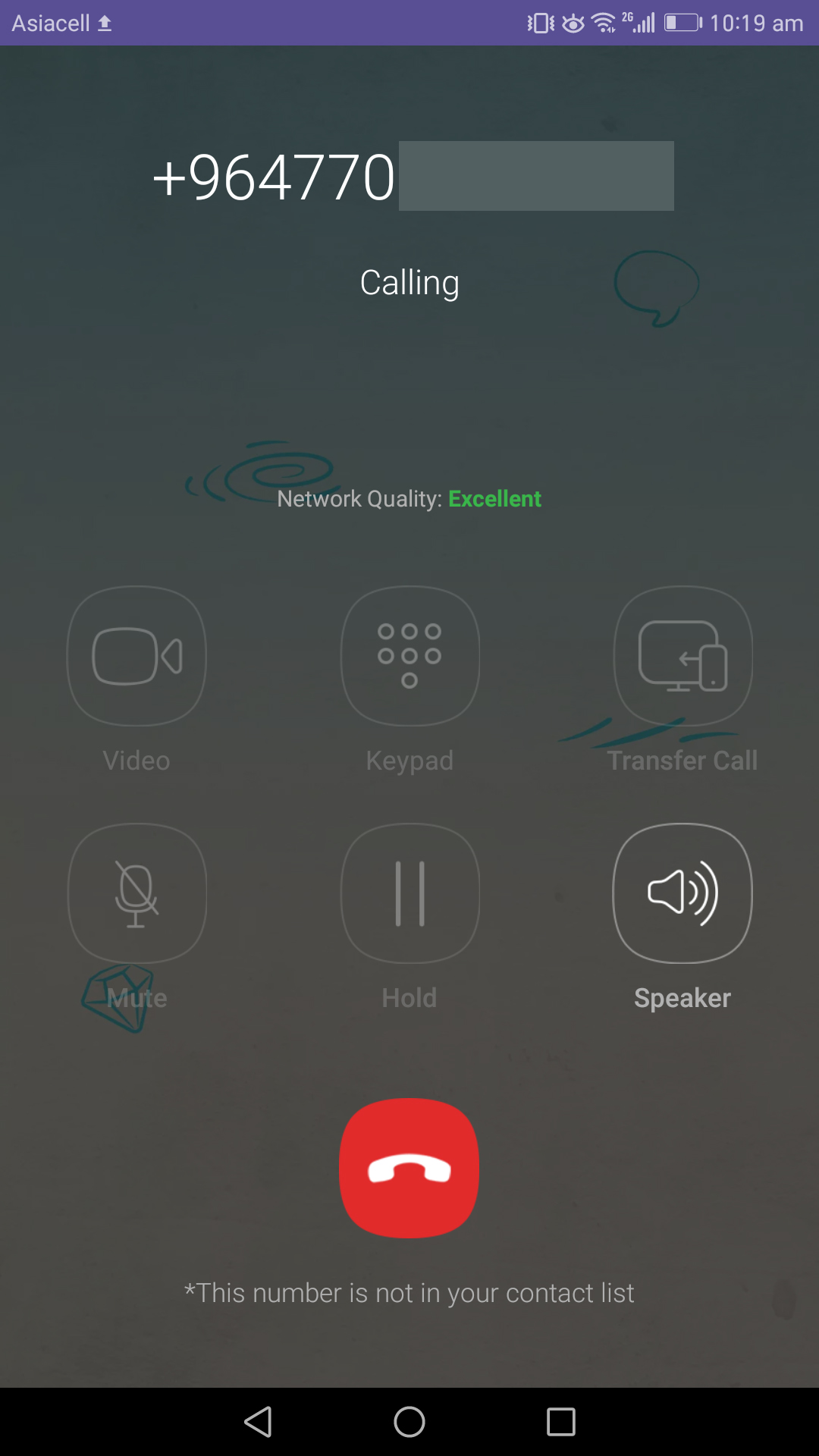 کوردی: دیمەنێک لە پرۆگرامی ڤایبەر لەسەر ئەندرۆید